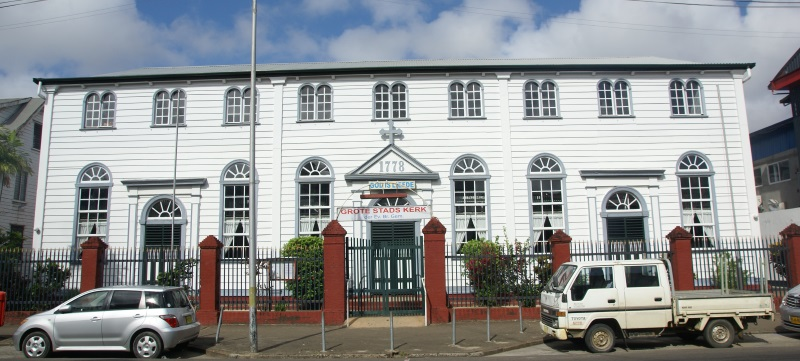 Grote Stadskerk, Steenbakkerijstraat 21, Paramaribo, Suriname